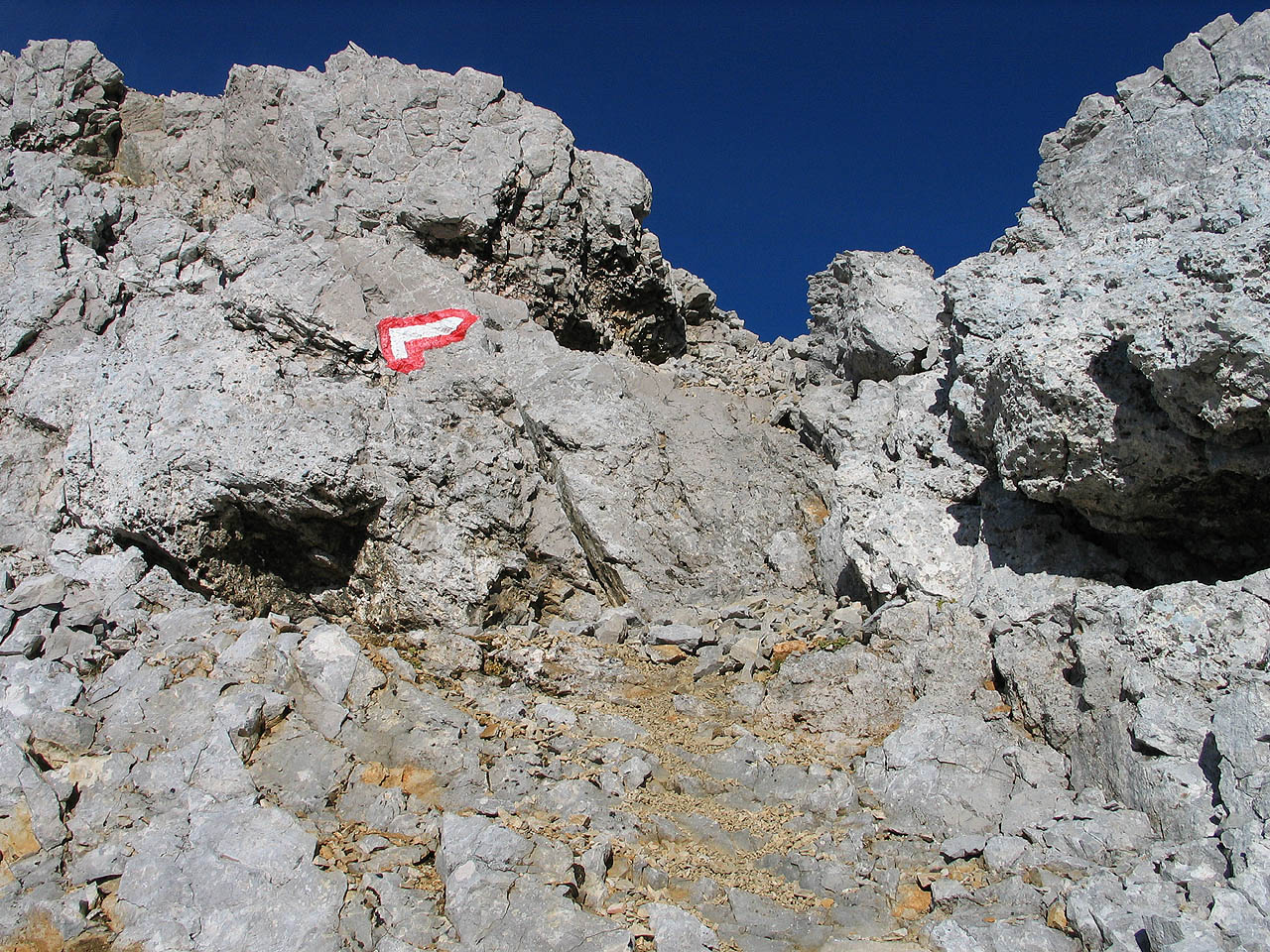 Wegmarkierung an der Bachofenspitze,Karwendel, Tirol, Österreich